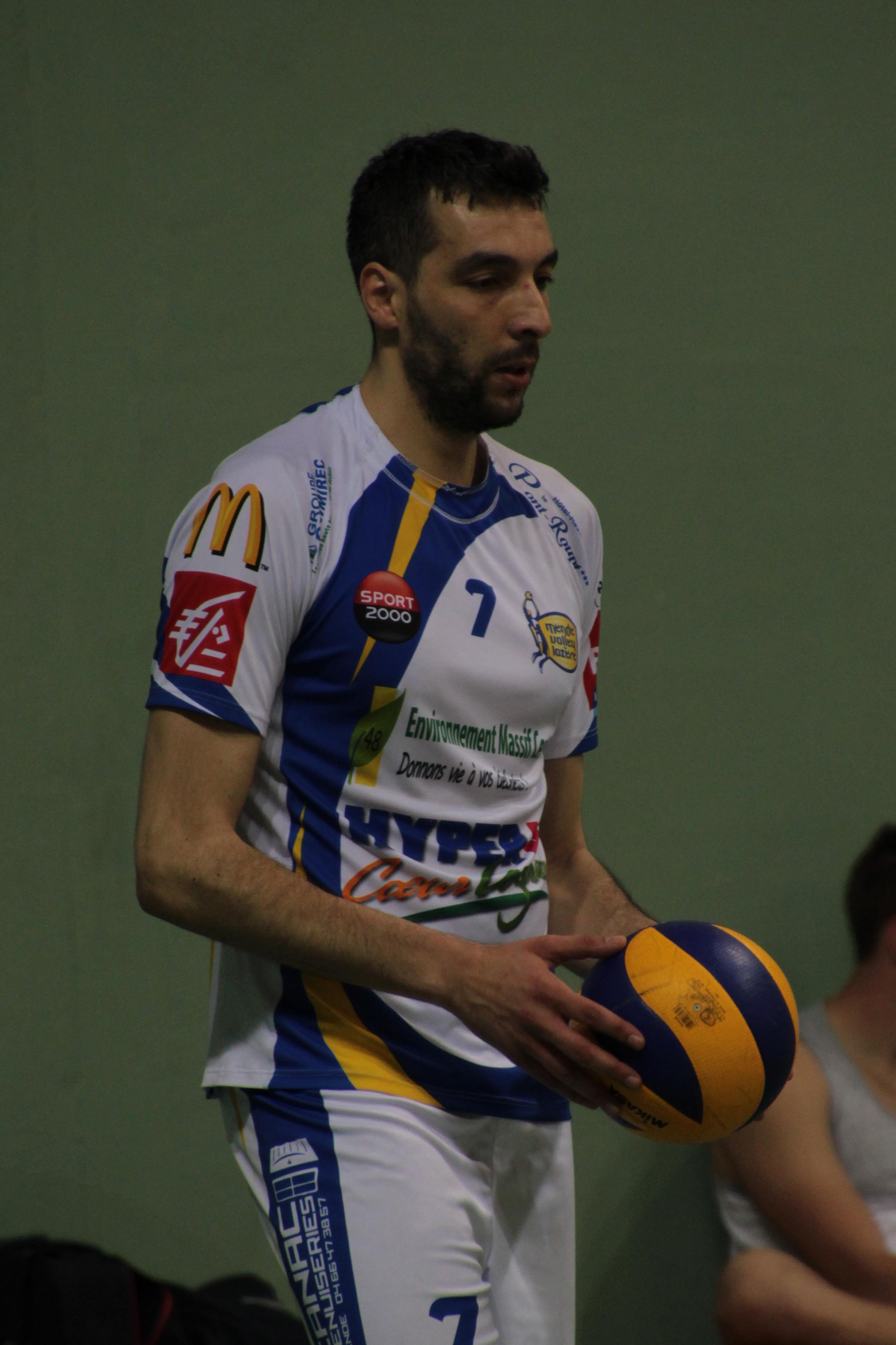 Le joueur algérien de volley-ball Ali Kerboua, sous le maillot du Mende Volley Lozère en avril 2017